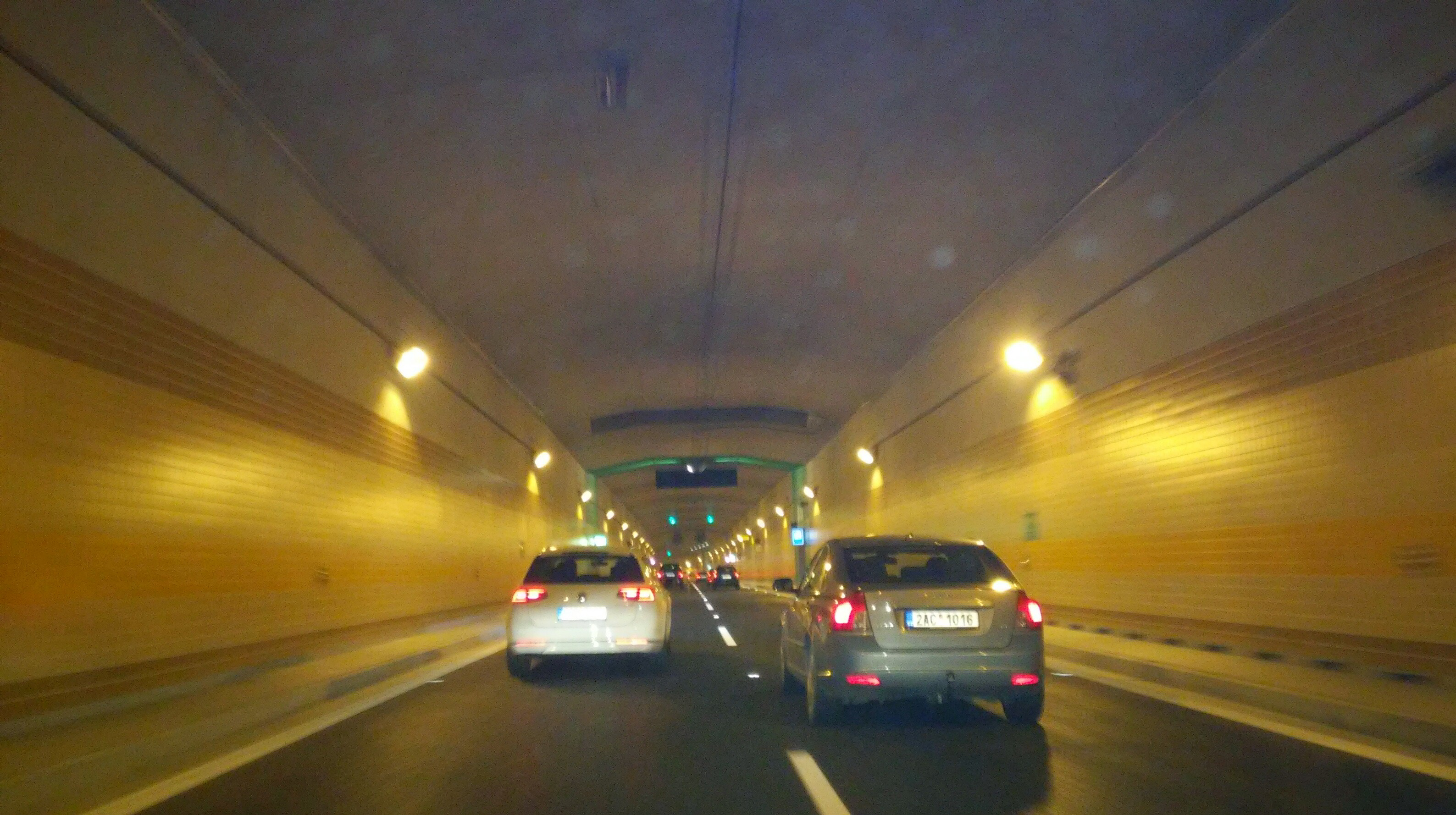 Brusnický tunel pod Střešovicemi